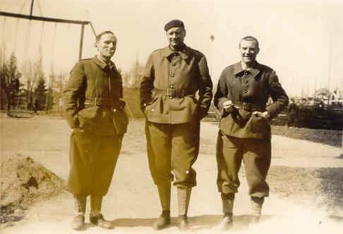 Charles Bichat (au centre) élève commissaire à l'Ecole Nationale Supérieure de la Police à Saint-Cyr-au-Mont-d'Or 4ème promotion septembre 1943-juin 1944